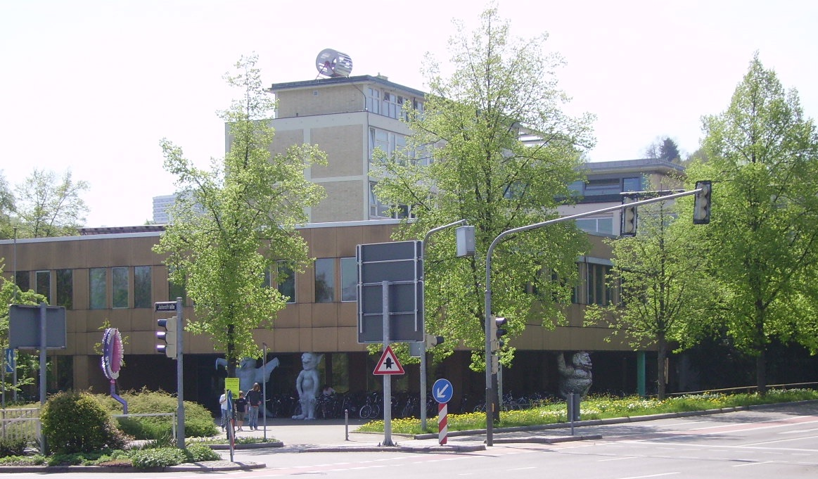 Werner-Heisenberg-Gymnasium Göppingen mit Neubau